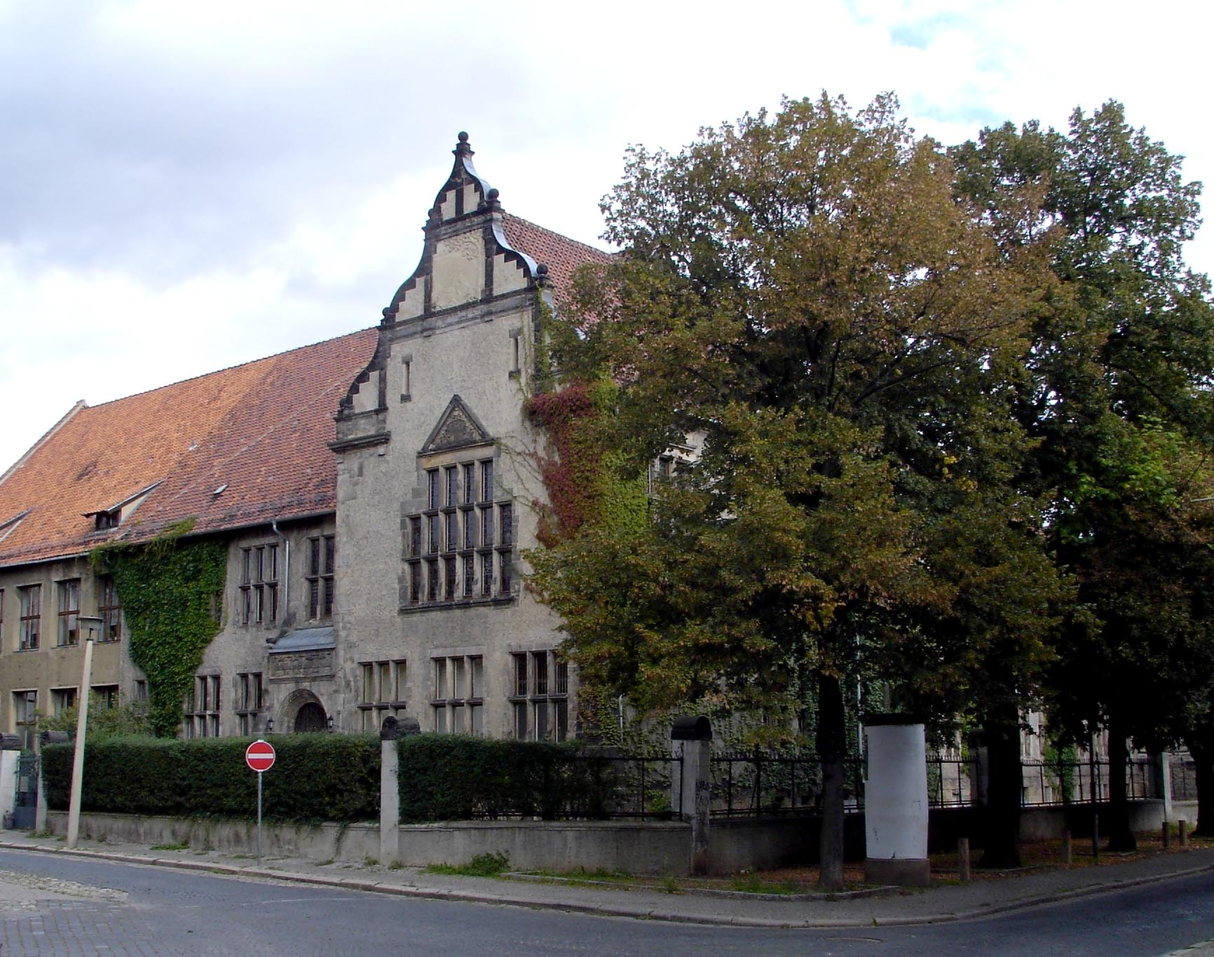 GutsMuths-Gymnasium in Quedlinburg (Germany)